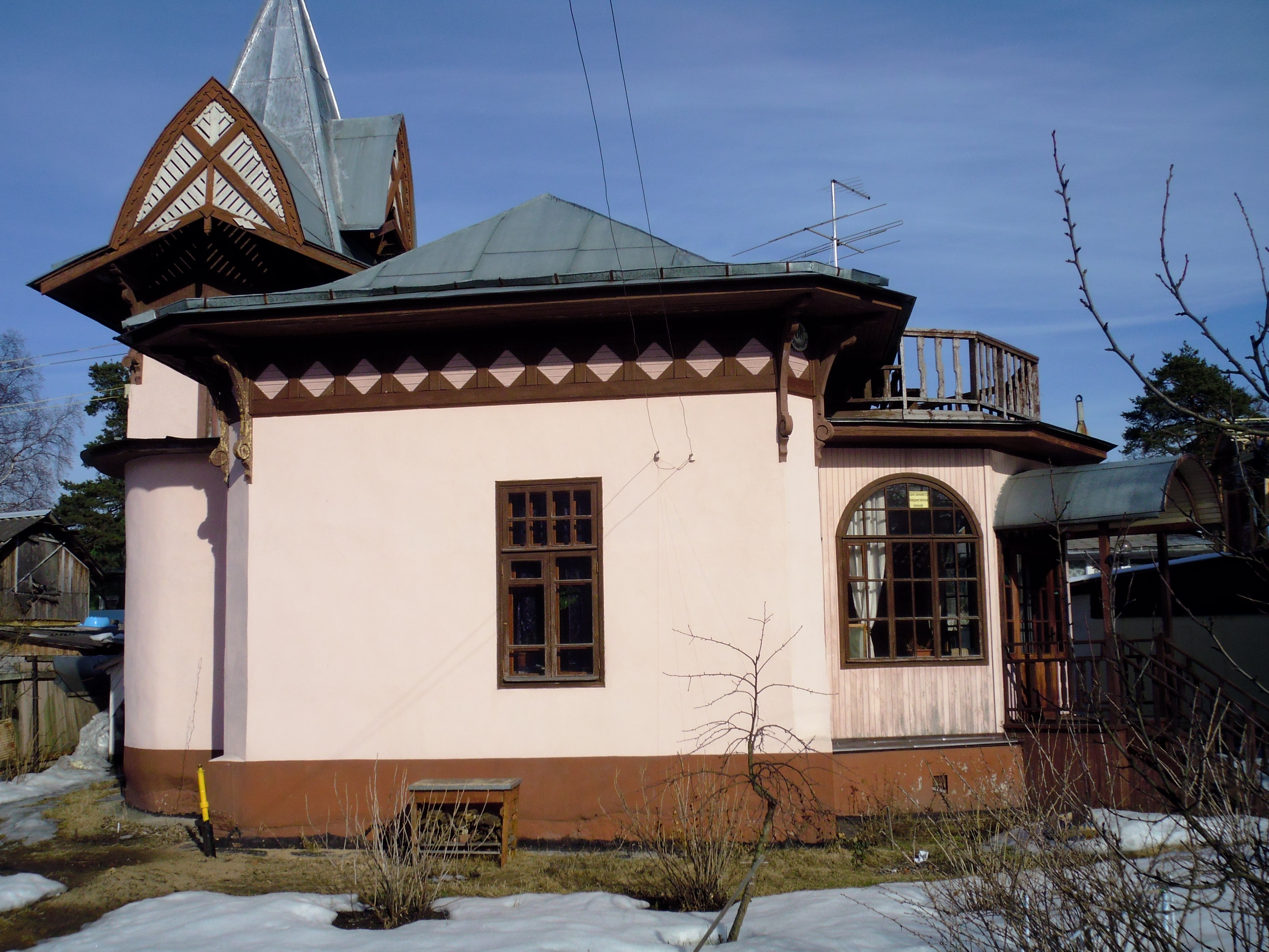 Дом (дача) архитектора Бальди Карла Валериановича (1861-1921) в Сестрорецке СПб на улице Коммунаров д.66